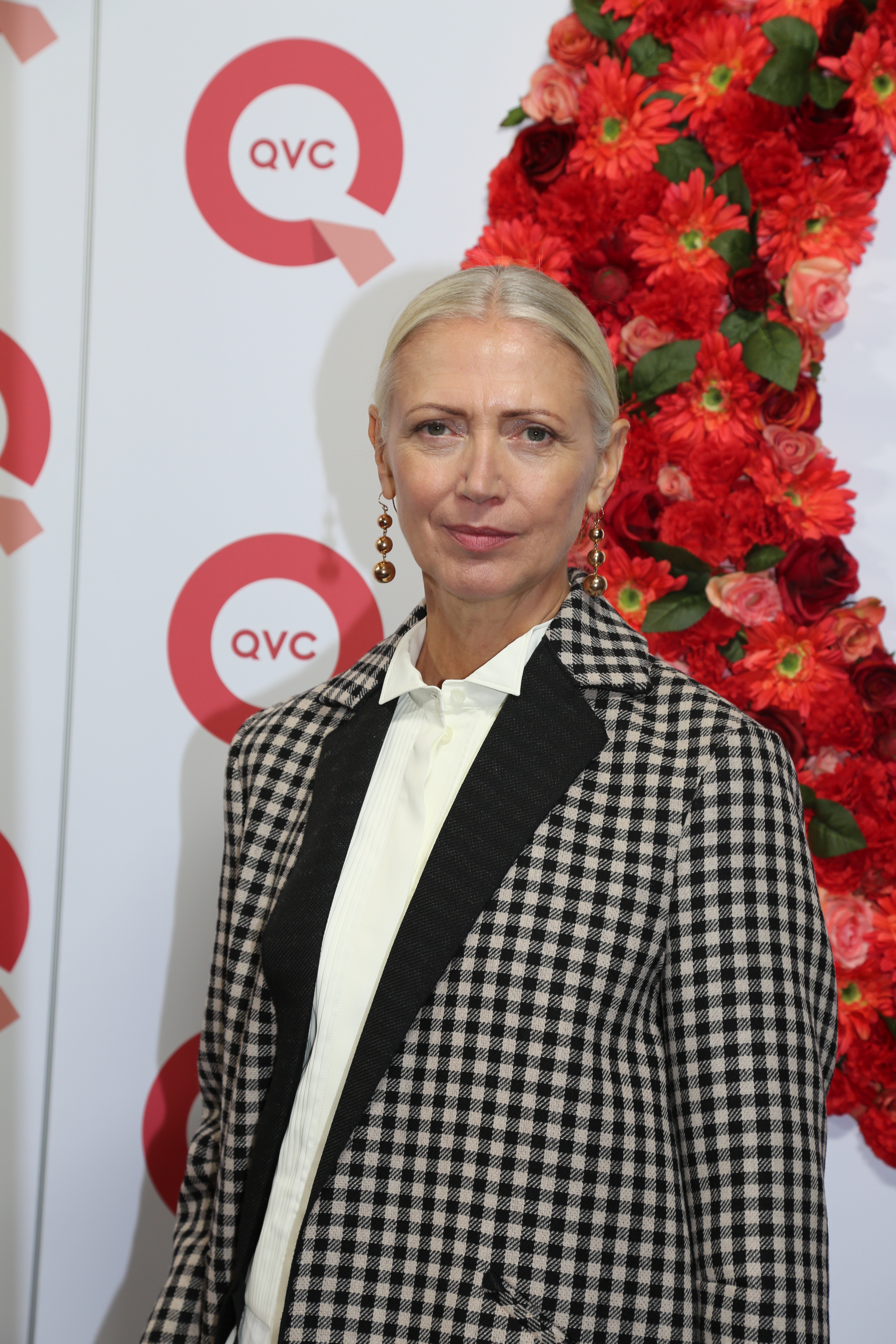 Christiane Arp beim QVC Fashion-Event zur "VOGUE Fashion's Night Out", am 08.09.2017 in Düsseldorf.